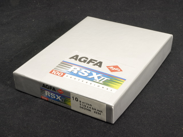 AGFA RSXII, Farbdiafilm, 9x12 cm, Verpackung